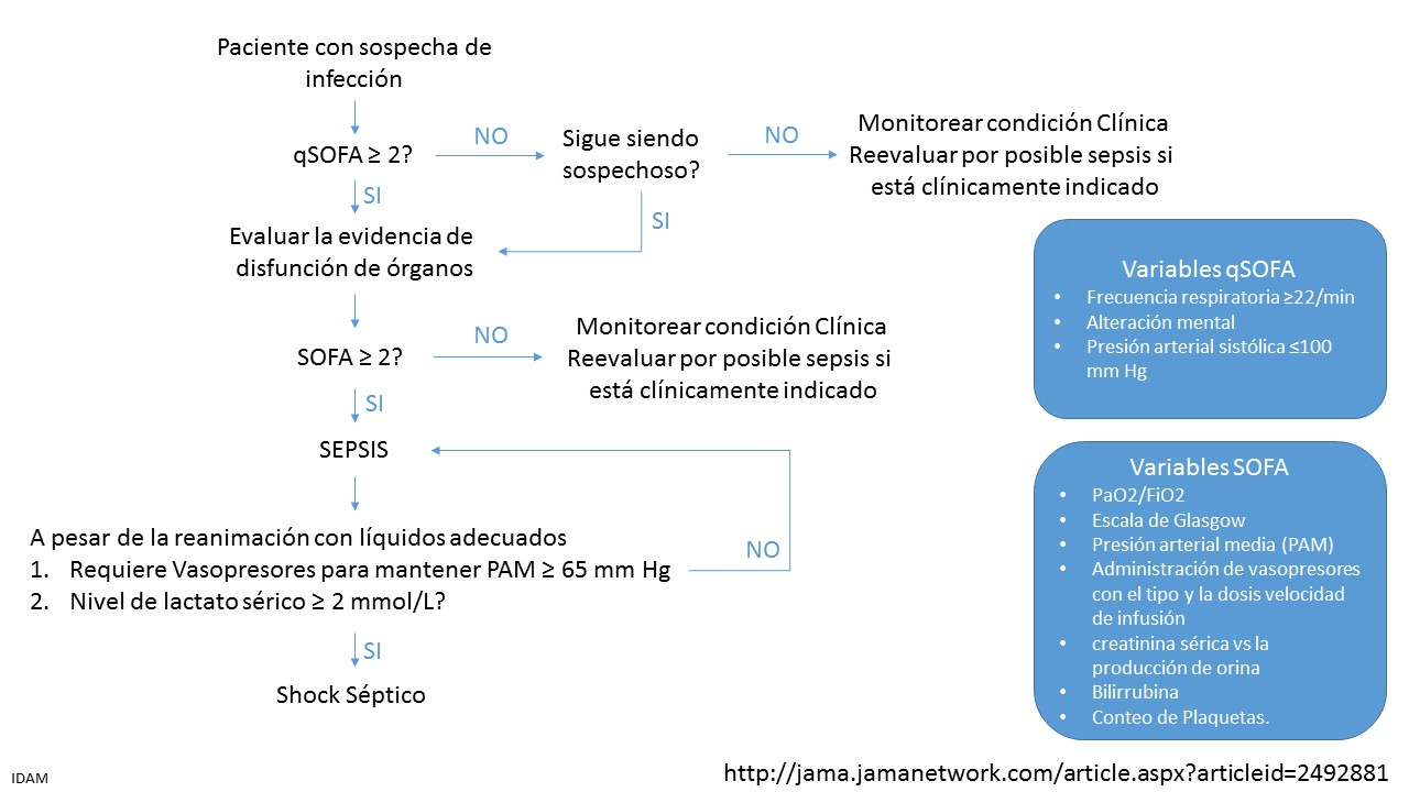 Nuevo flujograma de sepsis según Sepsis-3 de febrero de 2016.